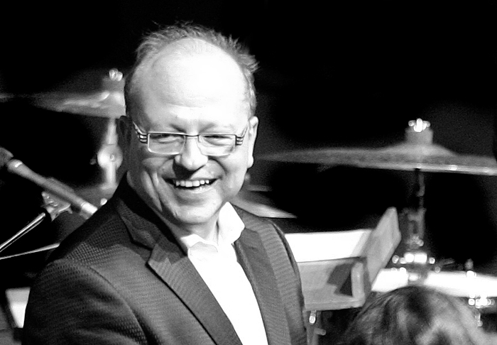 Frank Chastenier bei einem Konzert 2010